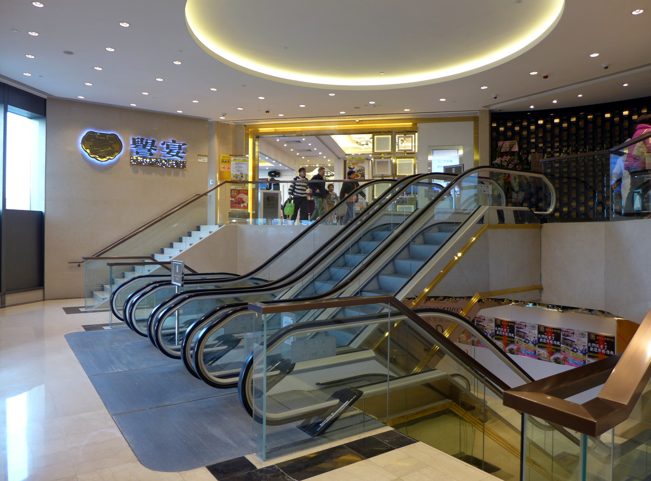 Sino Plaza Level 2 201312